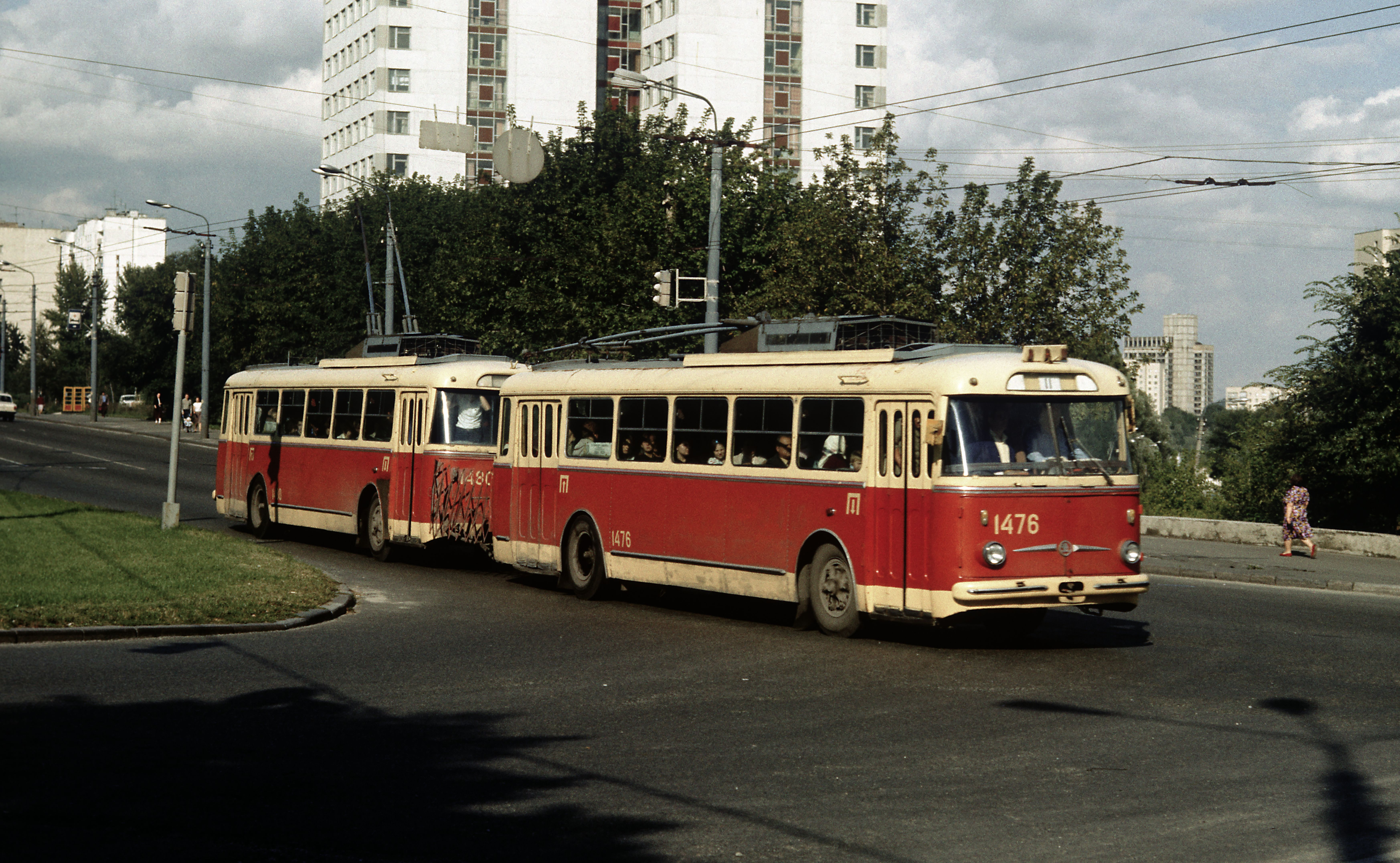 Zwei gekuppelte Obusse des Typs 9Tr auf der Linie 11 im Holosiivskij Prospekt. Nur der geführte Wagen läuft mit angelegten Stromabnehmern, die Lenkung entspricht einem Anhänger mit Achsschenkellenkung. Ausschnitt